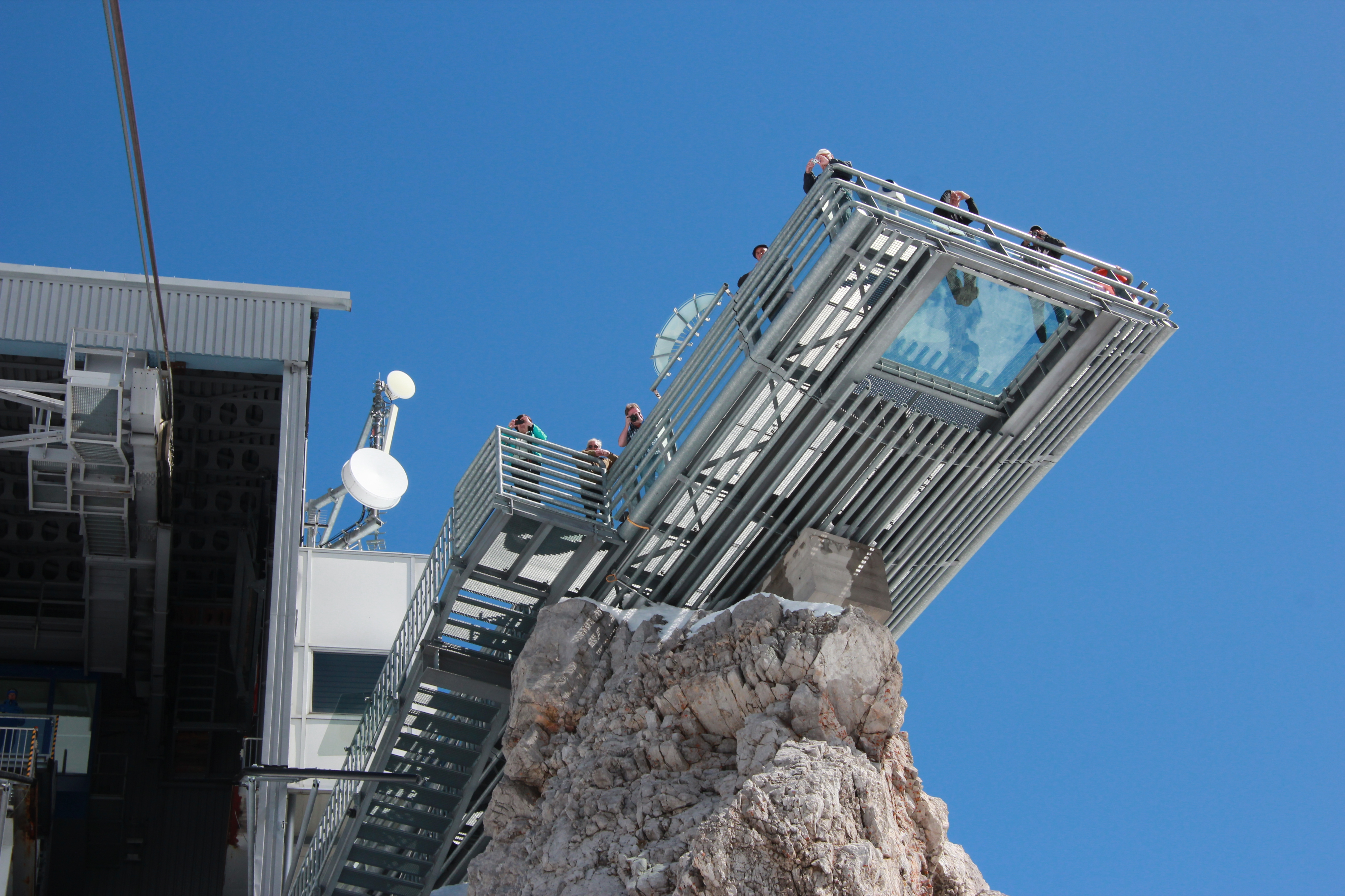 Bilder rund um die Dachsteinsüdwand und Dachsteinseilbahn